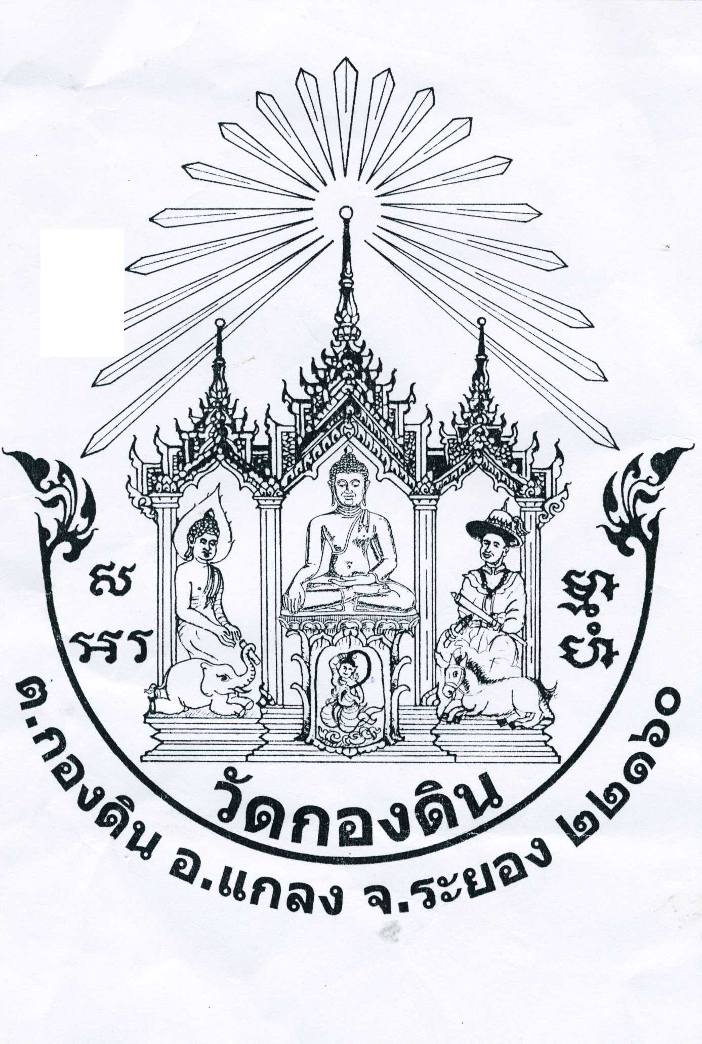 เป็นตราประจำวัดกองดิน